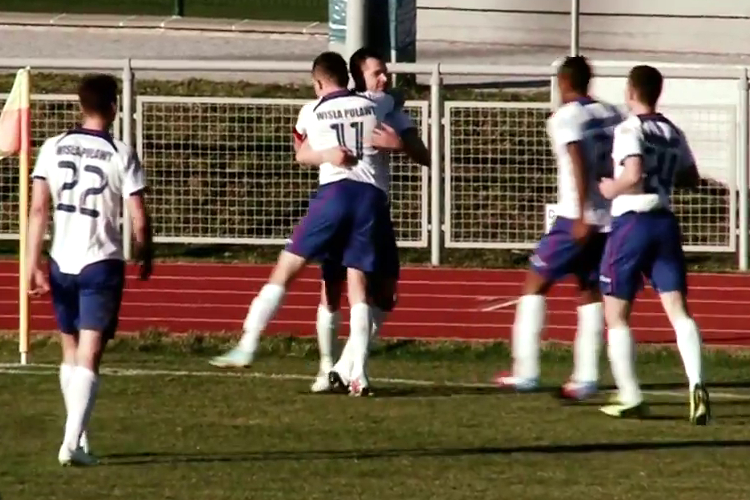 Zawodnicy Wisły Puławy po strzeleniu przez Nowaka bramki na 1:0 w 16. minucie meczu II ligi z Wigrami Suwałki.